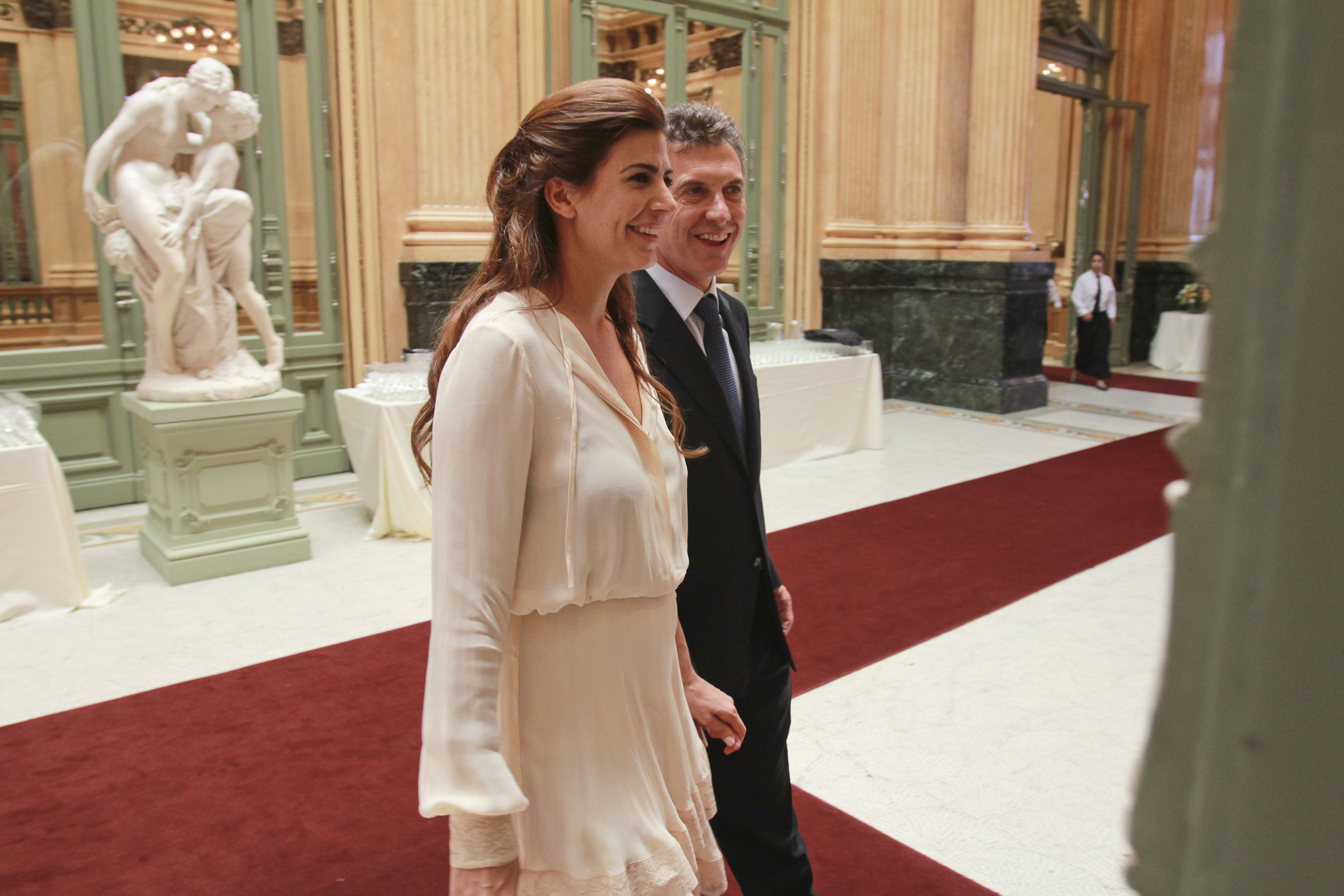 El Jefe de Gobierno porteño, Mauricio Macri y su esposa, Juliana Awada asisten a la Función Extraordinaria, celebrada en el Teatro Colón, este mediodía.